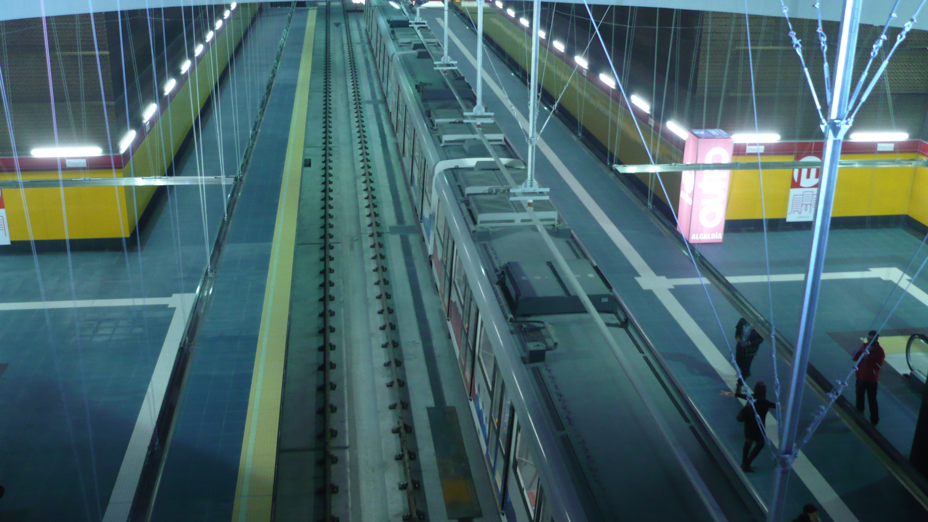 Foto del interior de la Estación Iñaquito del Metro de Quito en marzo de 2019. Es la única estación terminada a la fecha.